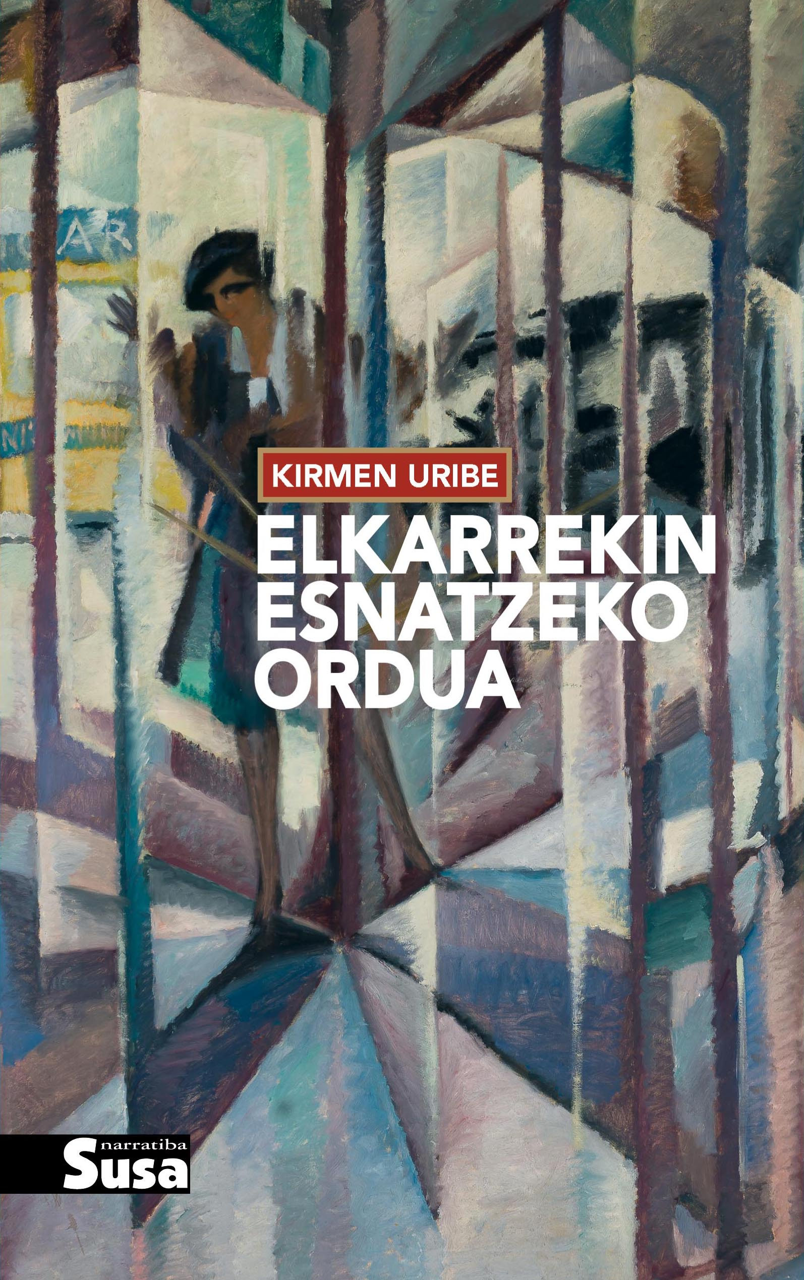 Kirmen Uriberen Elkarrekin esnatzeko ordua liburuaren azala. Susa. 2016.